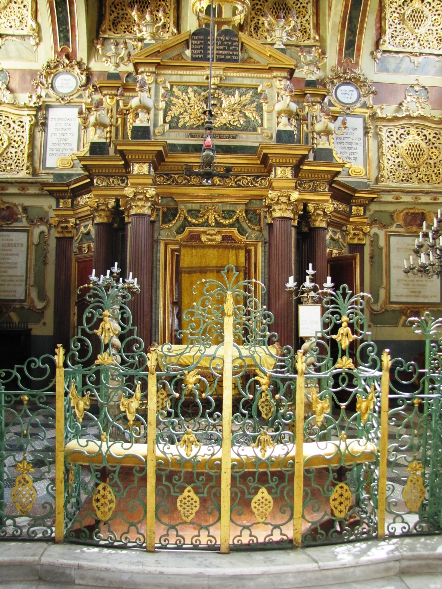 Casale Monferrato Synagogue